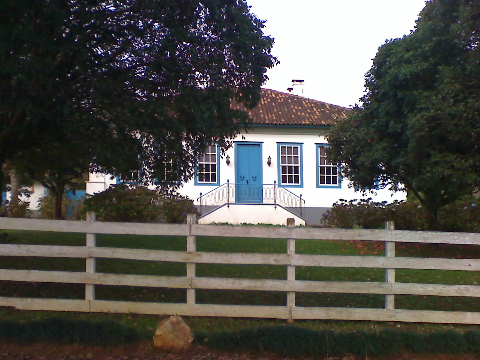 CASA PROXIMO AOS VENTURA